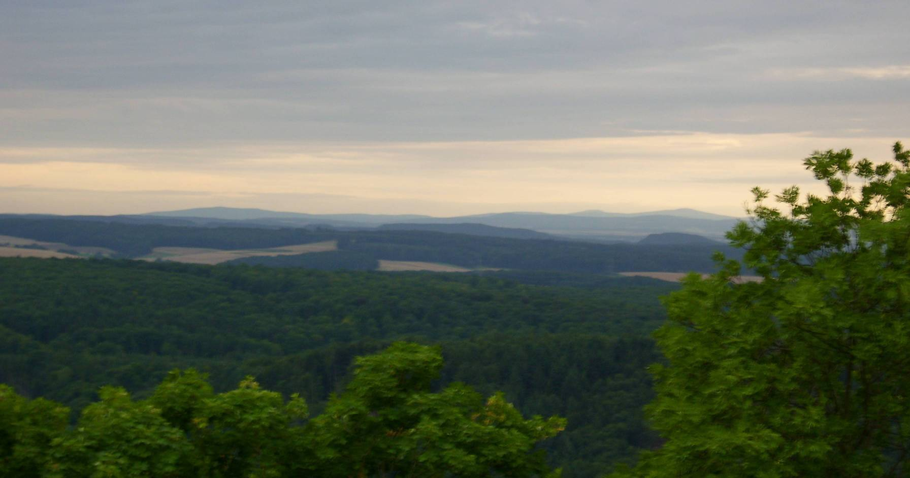 Blick vom Frauenberg auf den Taunus mit Steinkopf (518m, halblinks) und den über 60 km entfernten höchsten Erhebungen Altkönig (798m, halbrechts) und Großem Feldberg (879m, rechts). 2 Ebenen vor dem Feldberg, am Südwestrand des Vorderen Vogelsbergs, der Lollarkopf (281m), links davon der Hangelstein (305m)